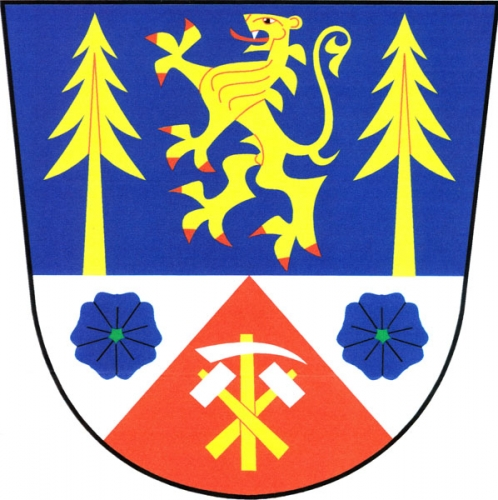 Znak, Oskava, okres Šumperk